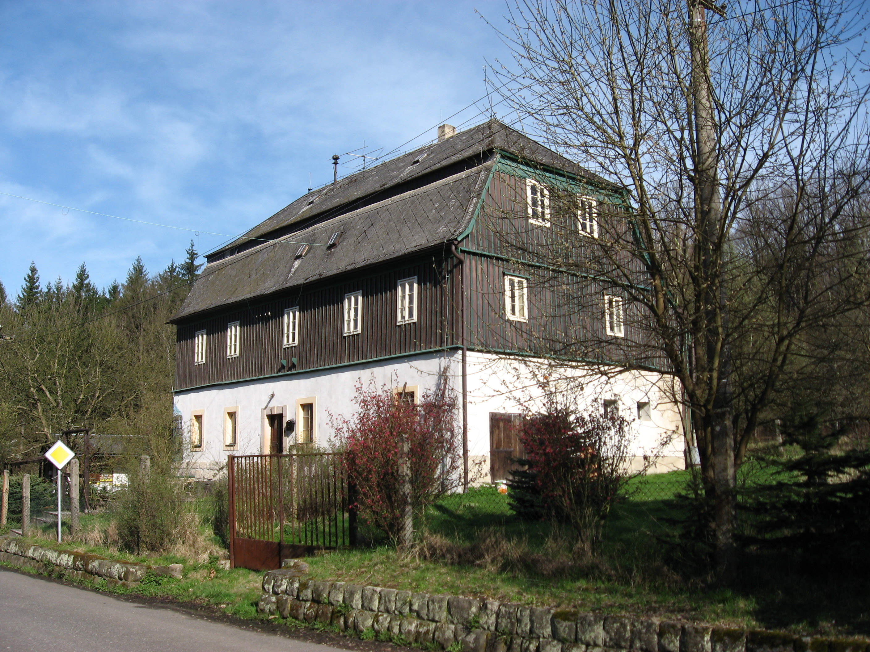 Mezná čp. 37, Mezní Louka, obec Hřensko.